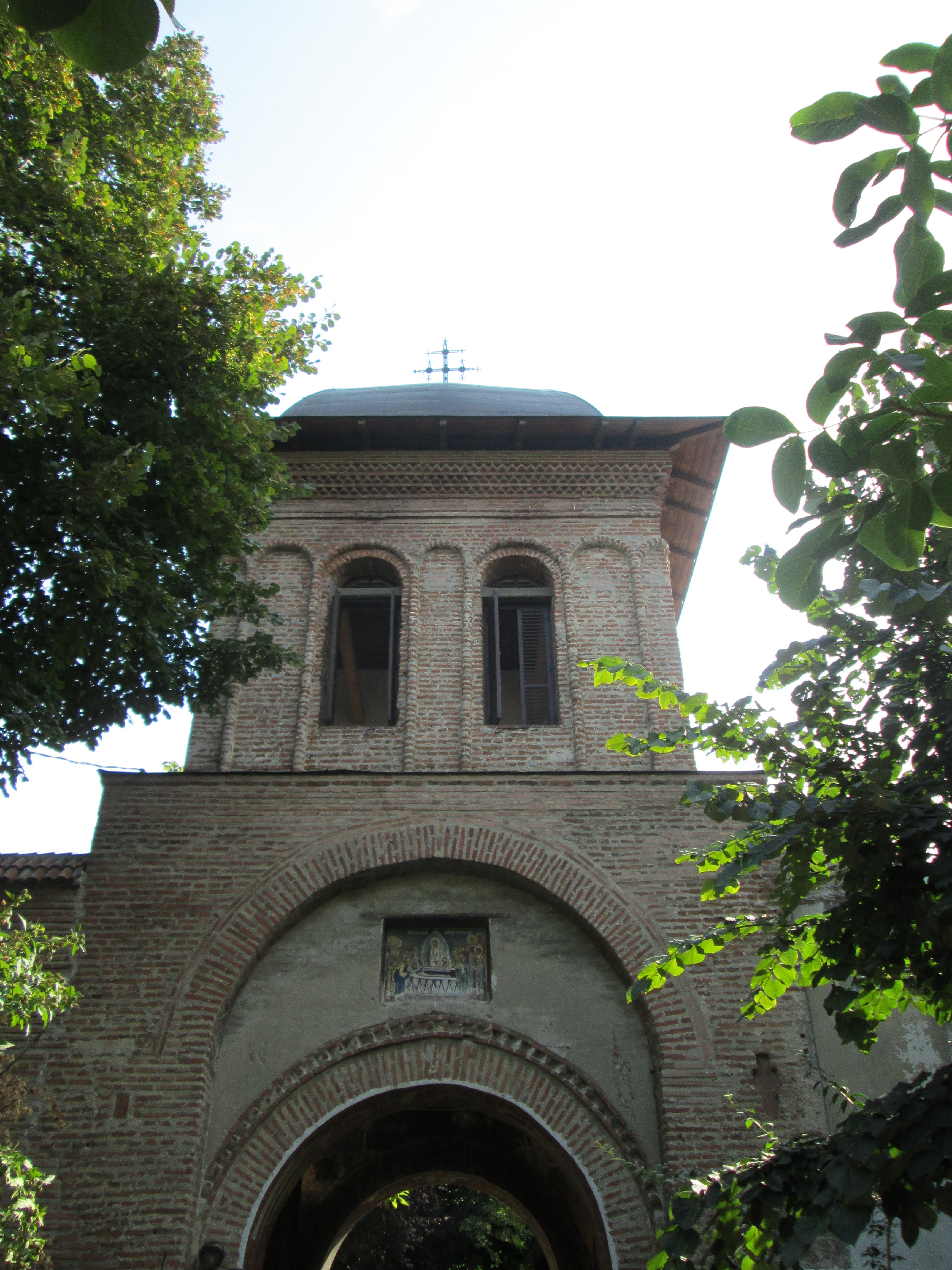 Mănăstirea Mărcuța